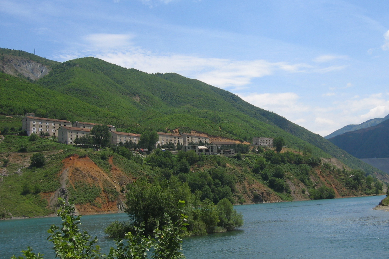 Fierza in Northern Albania